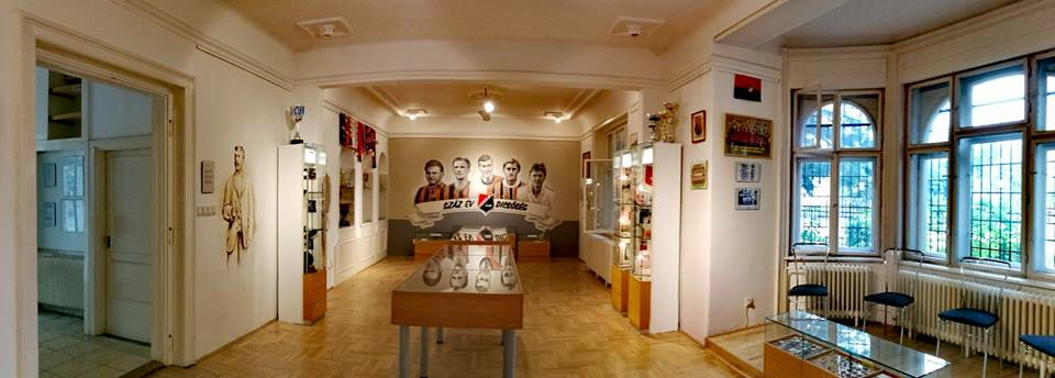 Futball Ház, nagy terem